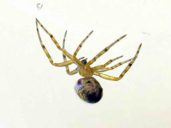 Foto tirada cunha Nikon E8800. Self made. Bastabales - Galicia - Spain